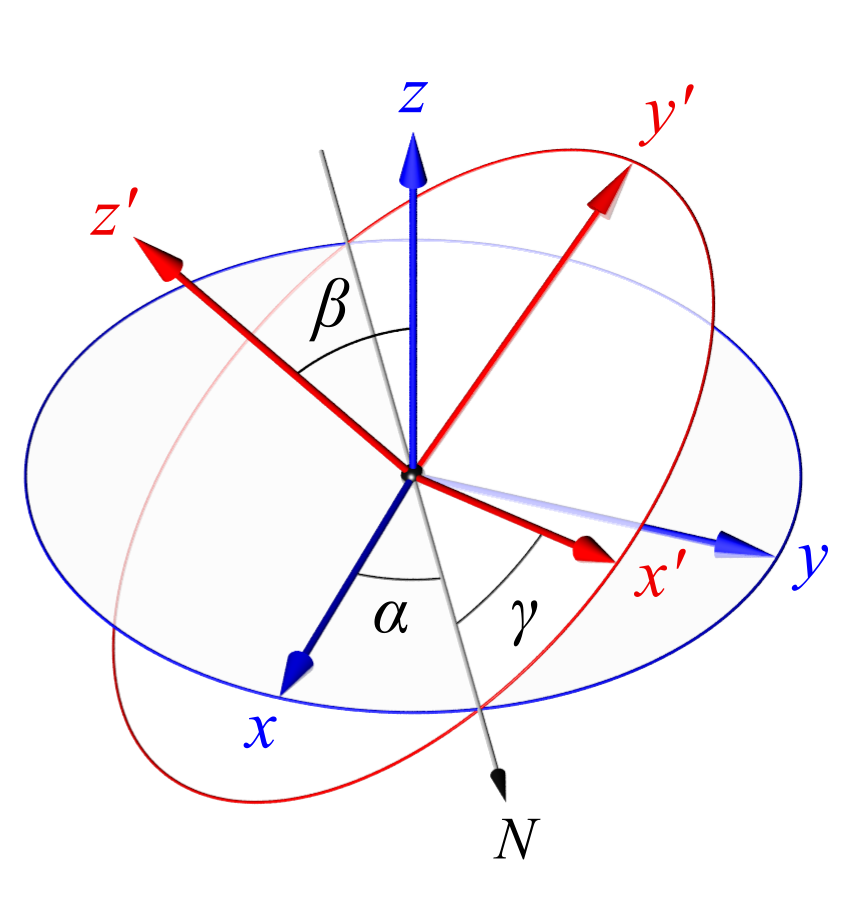 Eulervinklar